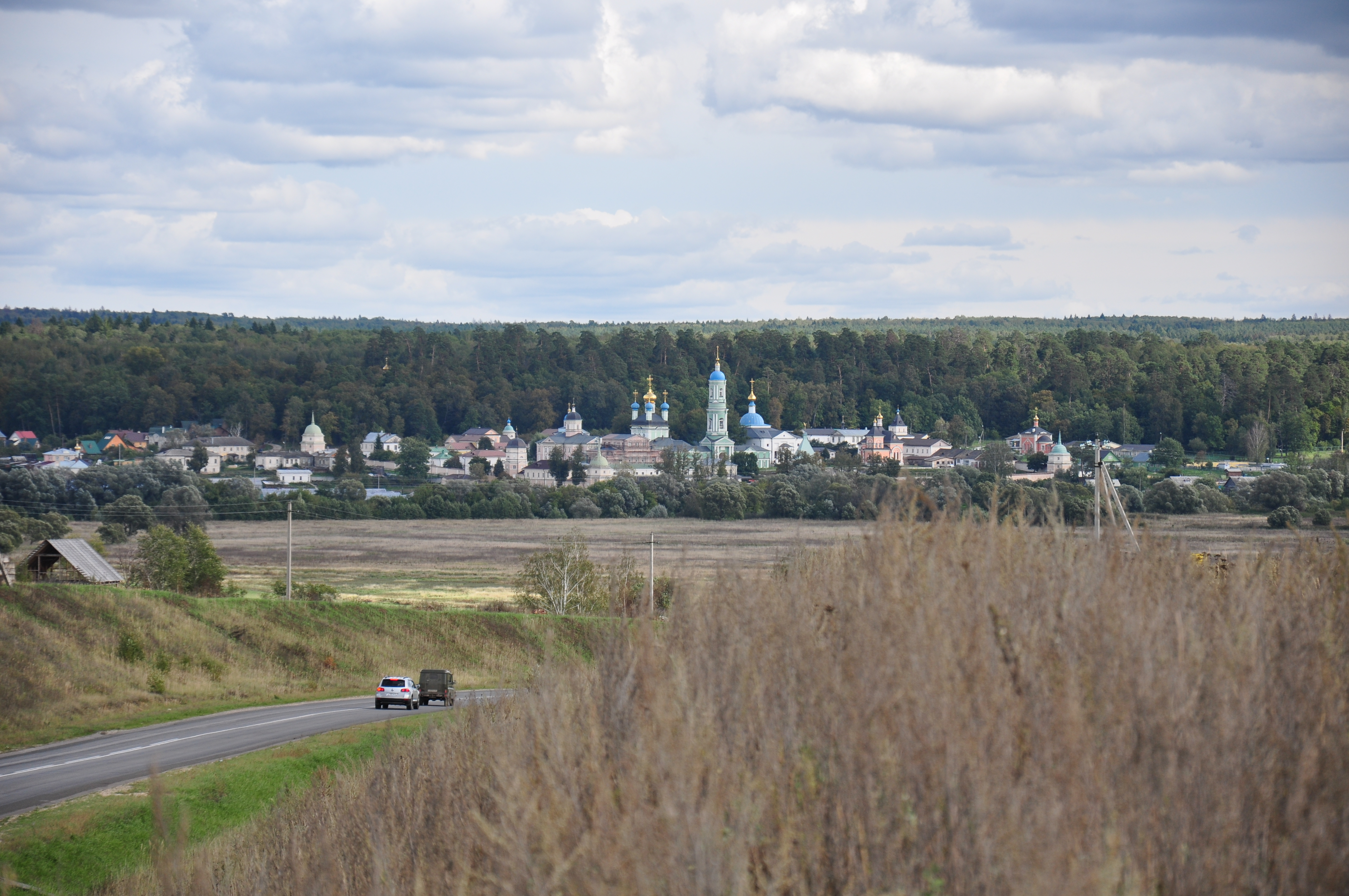 Ансамбль монастыря Оптина Пустынь (монастырь Оптина Пустынь, в котором бывали в разные годы Н. В. Гоголь, Ф. М. Достоевский, Л. Н. Толстой и др.) (Калужская область, Козельск, посёлок Оптино, Толстого улица, 3, 4, 5, 6, 8, 12, 16, 18, 20, 106, Западная улица, 11, 13, Лермонтова улица, 2, 3, 4, 5, 6, 8, 10, Пионерская улица)